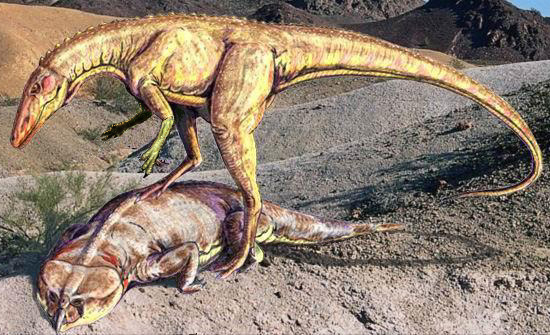 Staurikosaurus with a rhynchosaur, by Dimitri Bogdanov.